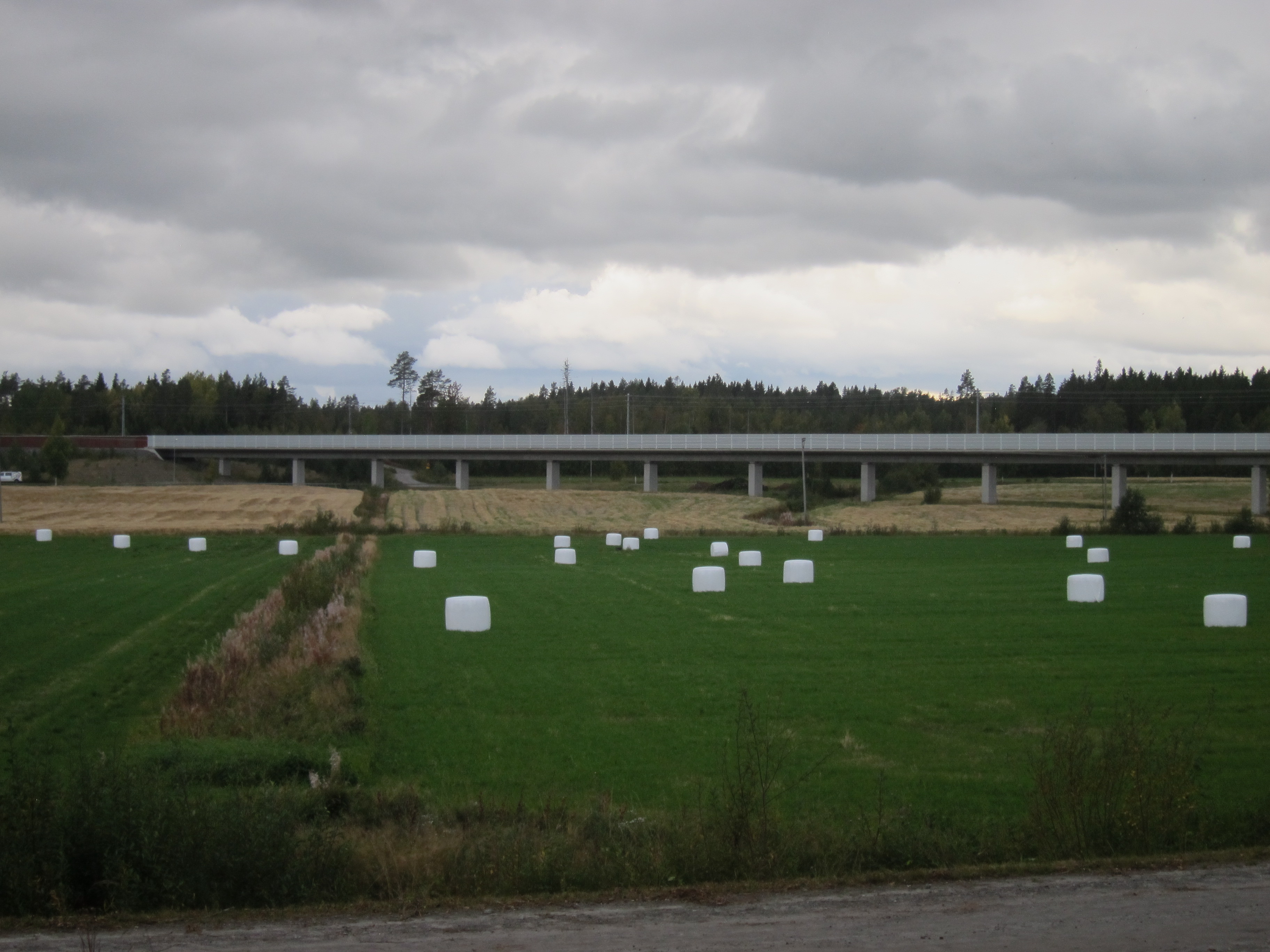 Stöckebron som en del av Botniabanan